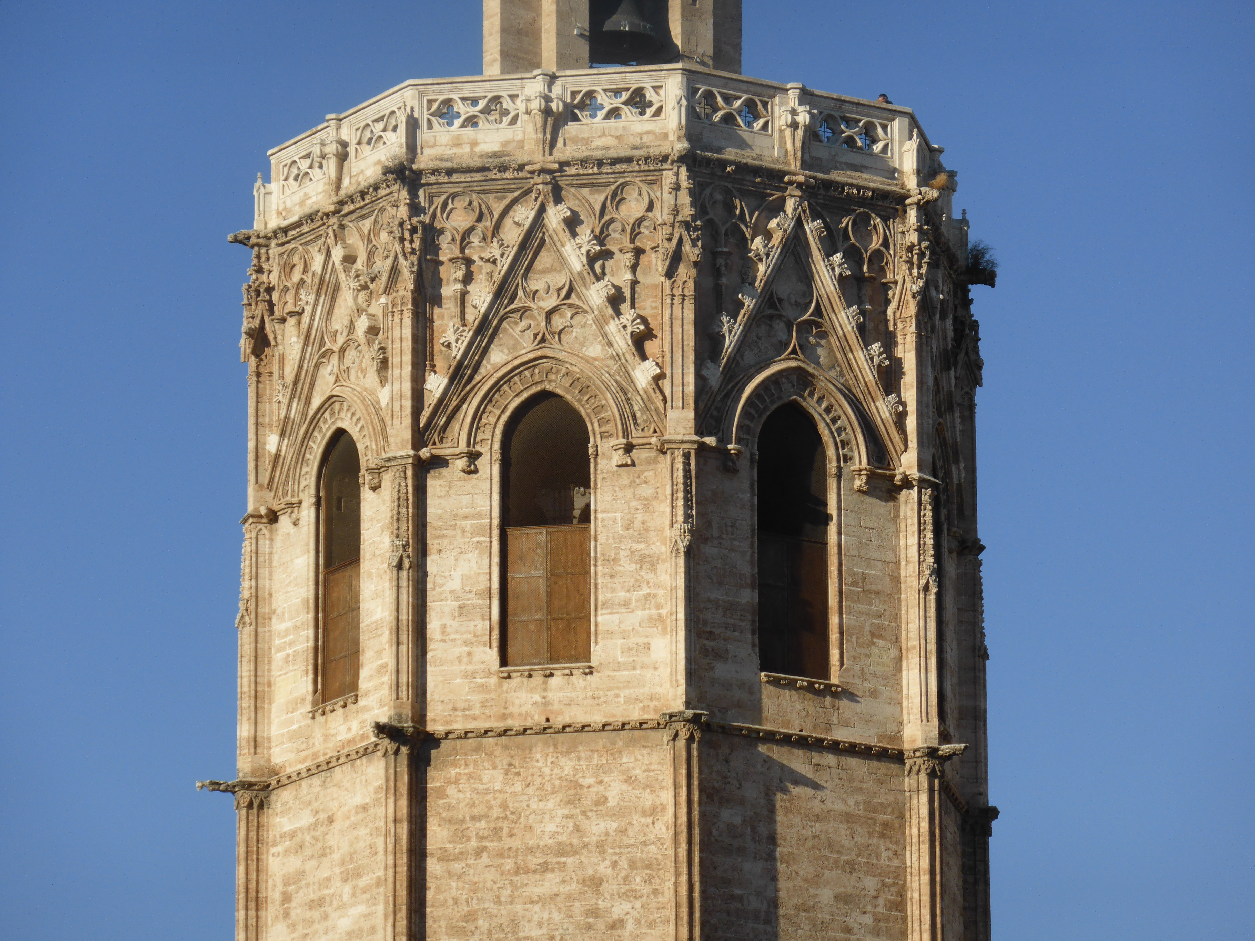 Ventanales de estilo gótico, de comienzos del siglo XV. Cuarto cuerpo de la torre, que corresponde a la sala de campanas. La torre del Miguelete o Micalet es uno de los símbolos de la ciudad de Valencia (España).